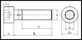 DIN 7984